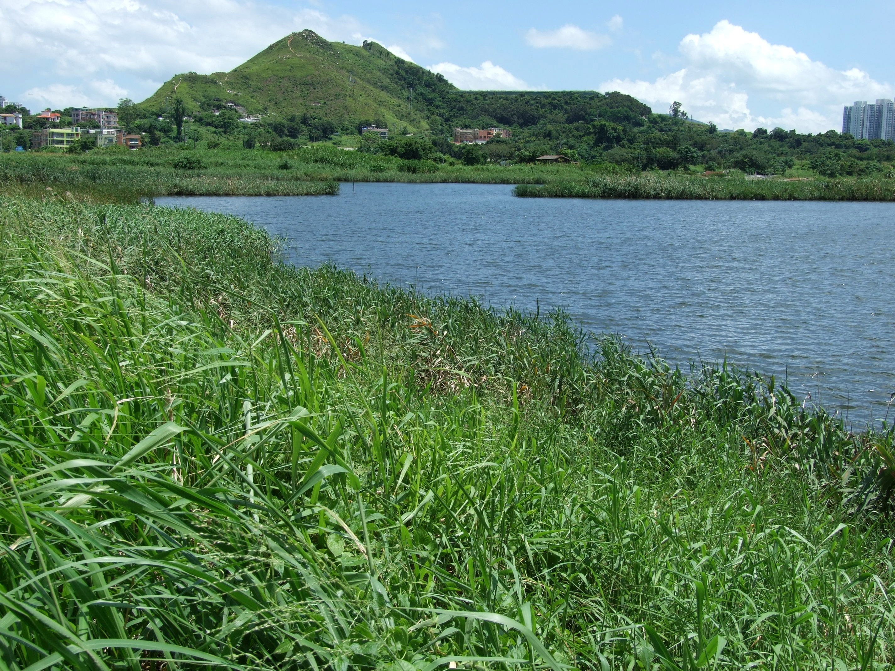 中文（香港）: 髻山